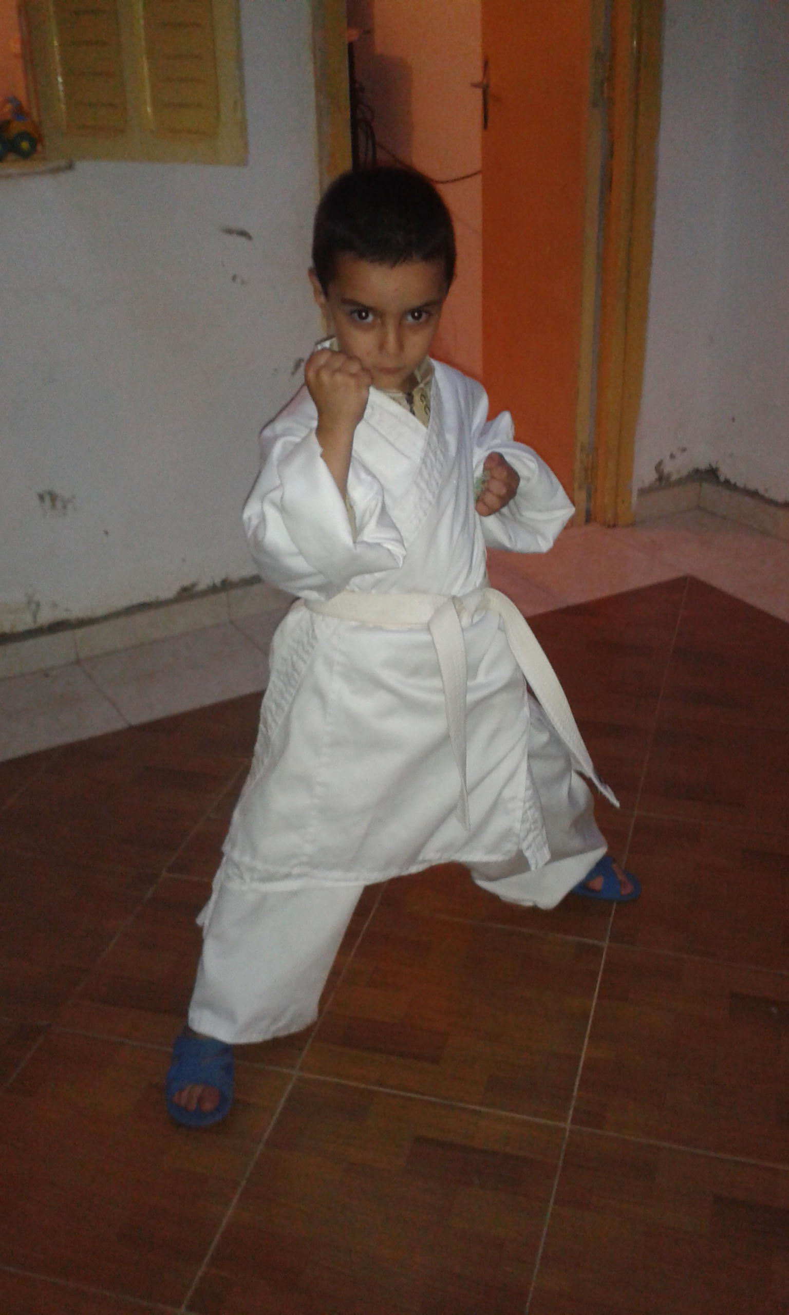 Karate kid طفل الكاراتيه مغربي